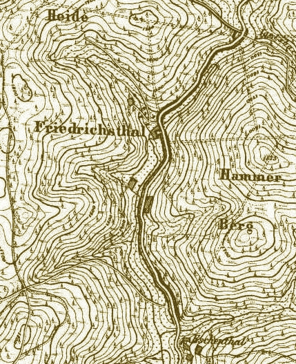 Ausschnitt mit der Lage von Friedrichsthal und Eschenthal.